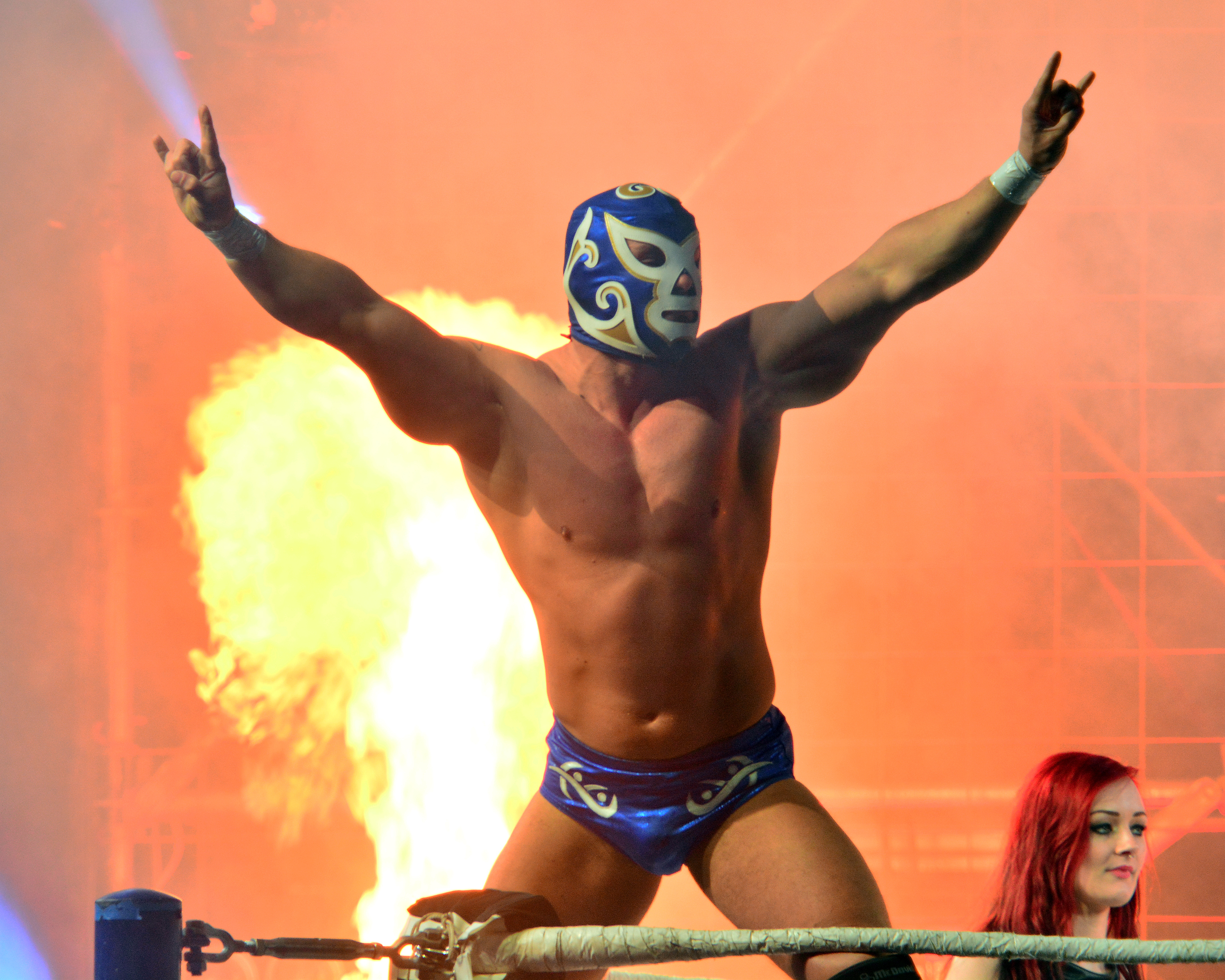 Blue Diablo (Jens van Gasteren), Wrestler im Bullhead Circus beim Wacken Open Air 2015